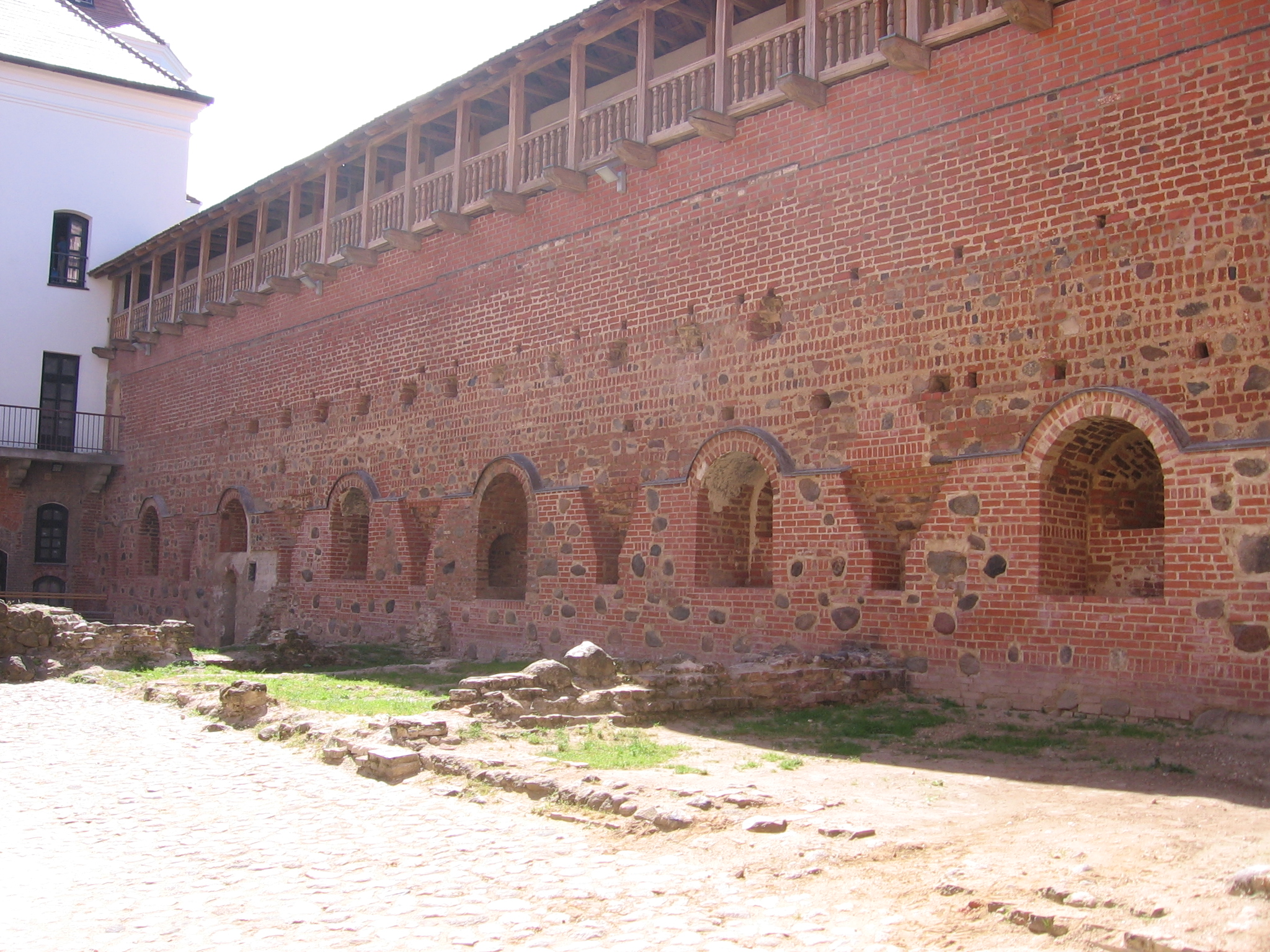 Мирский замок